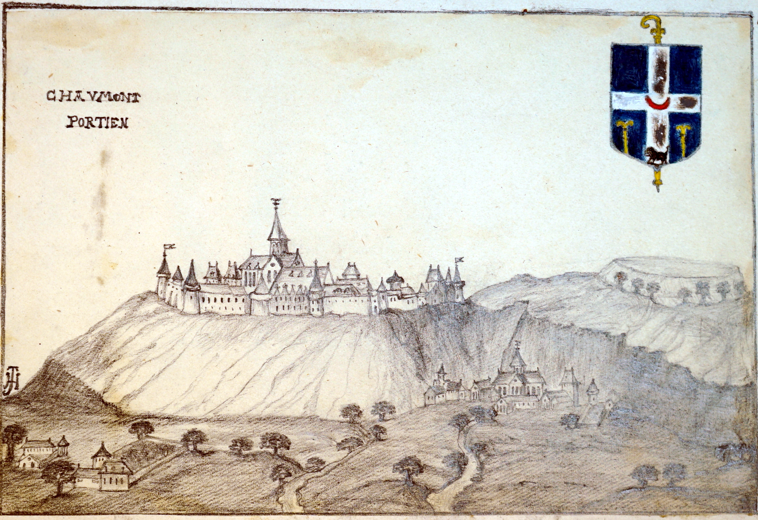 en ajout dans un recueil de dessins de Tassin.